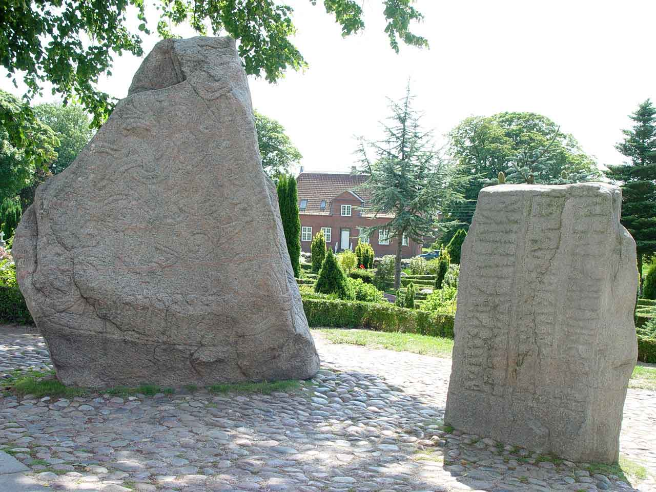 Runensteine Blauzahn und Gorm (rechts), Kirchenseite in Jelling